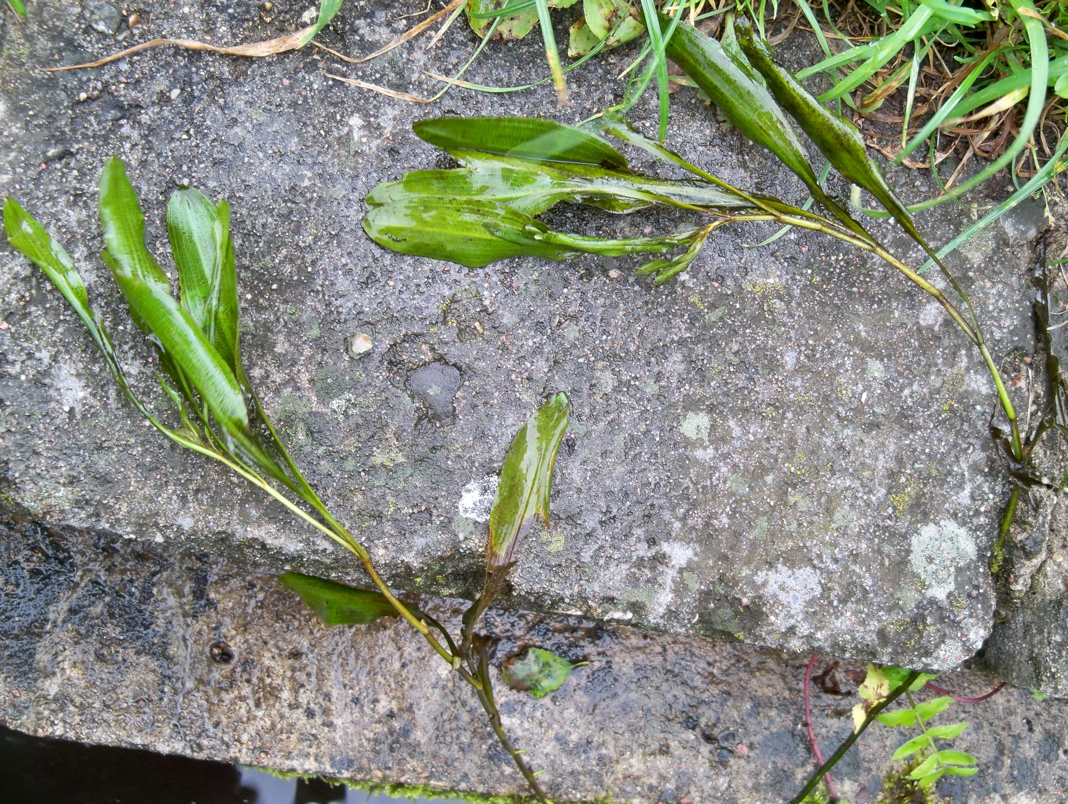 Wyciągnięta z wody (rzeka Rurzyca) rdestnica alpejska.